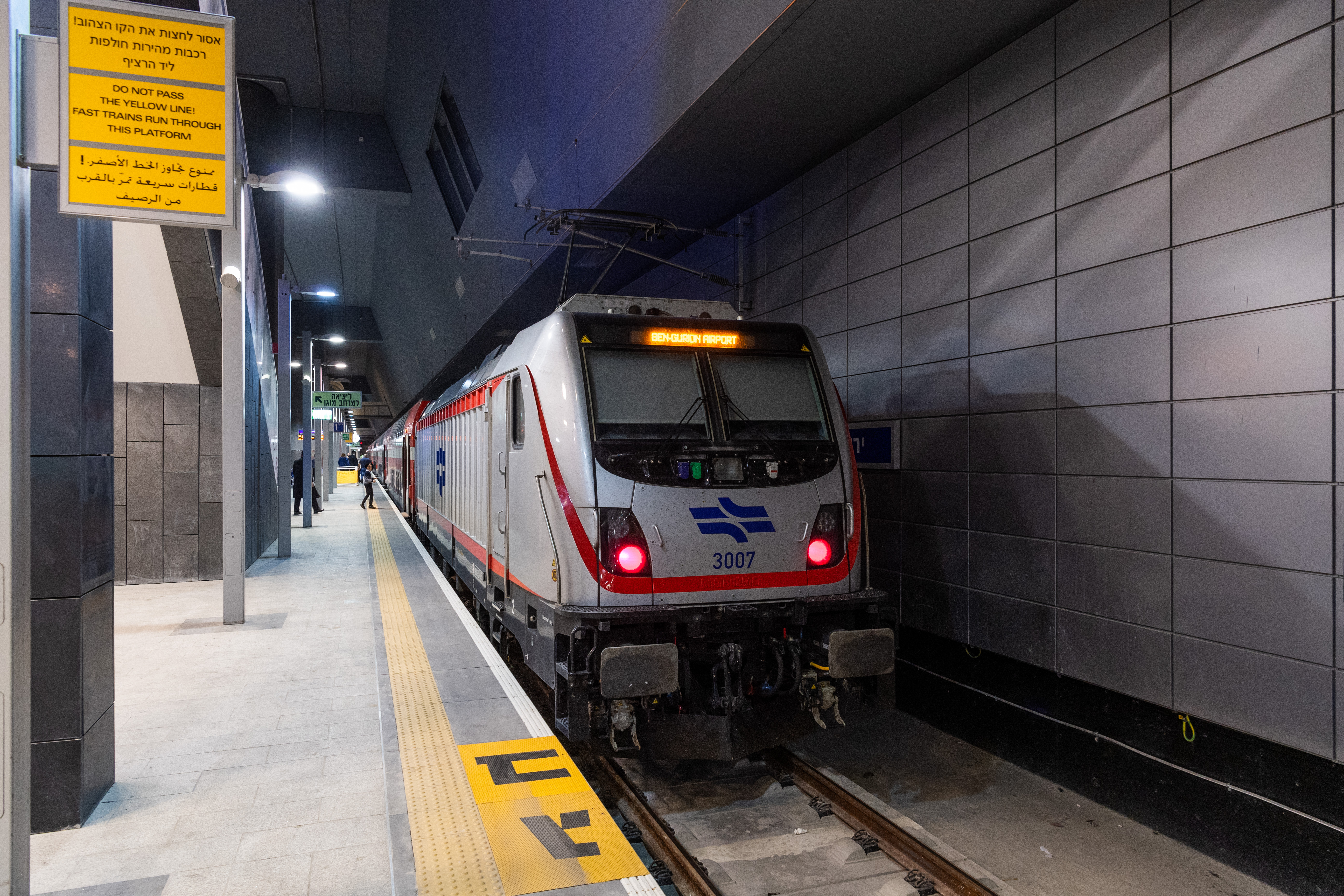 Электровоз Bombardier TRAXX P160 AC3 № 3007 на подземной железнодорожной станции «Иерусалим-Ицхак Навон» в Иерусалиме.